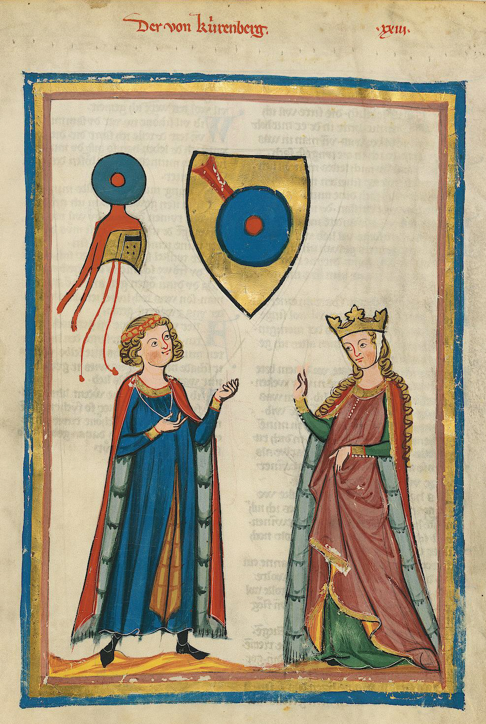 Codex Manesse, UB Heidelberg, Cod. Pal. germ. 848, fol. 63r, Der von Kürenberg